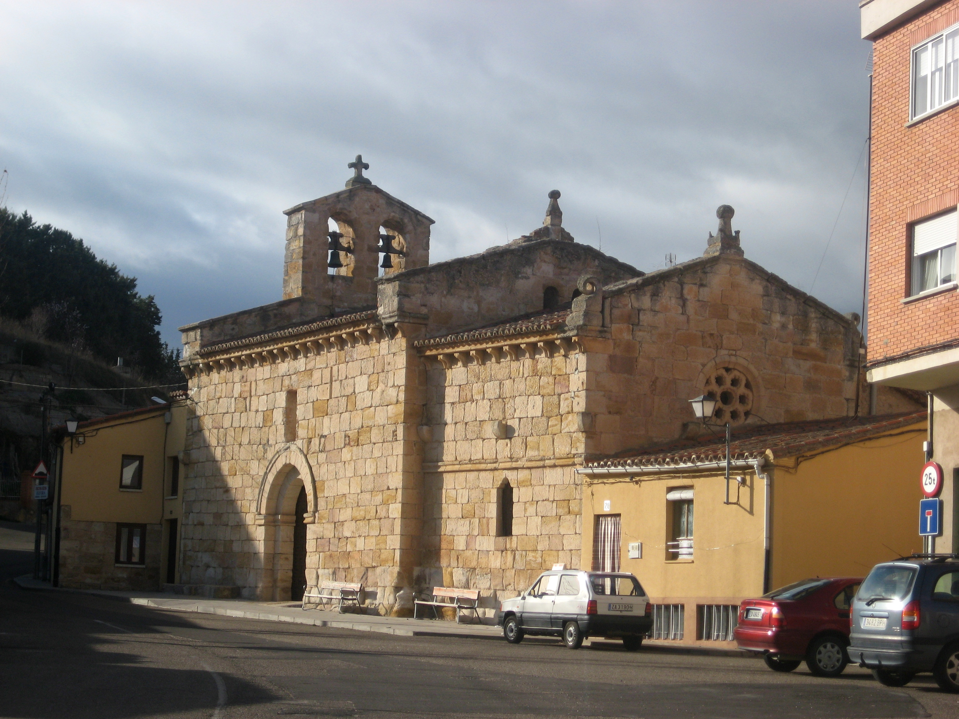 Iglesia del Espíritu Santo (Zamora)